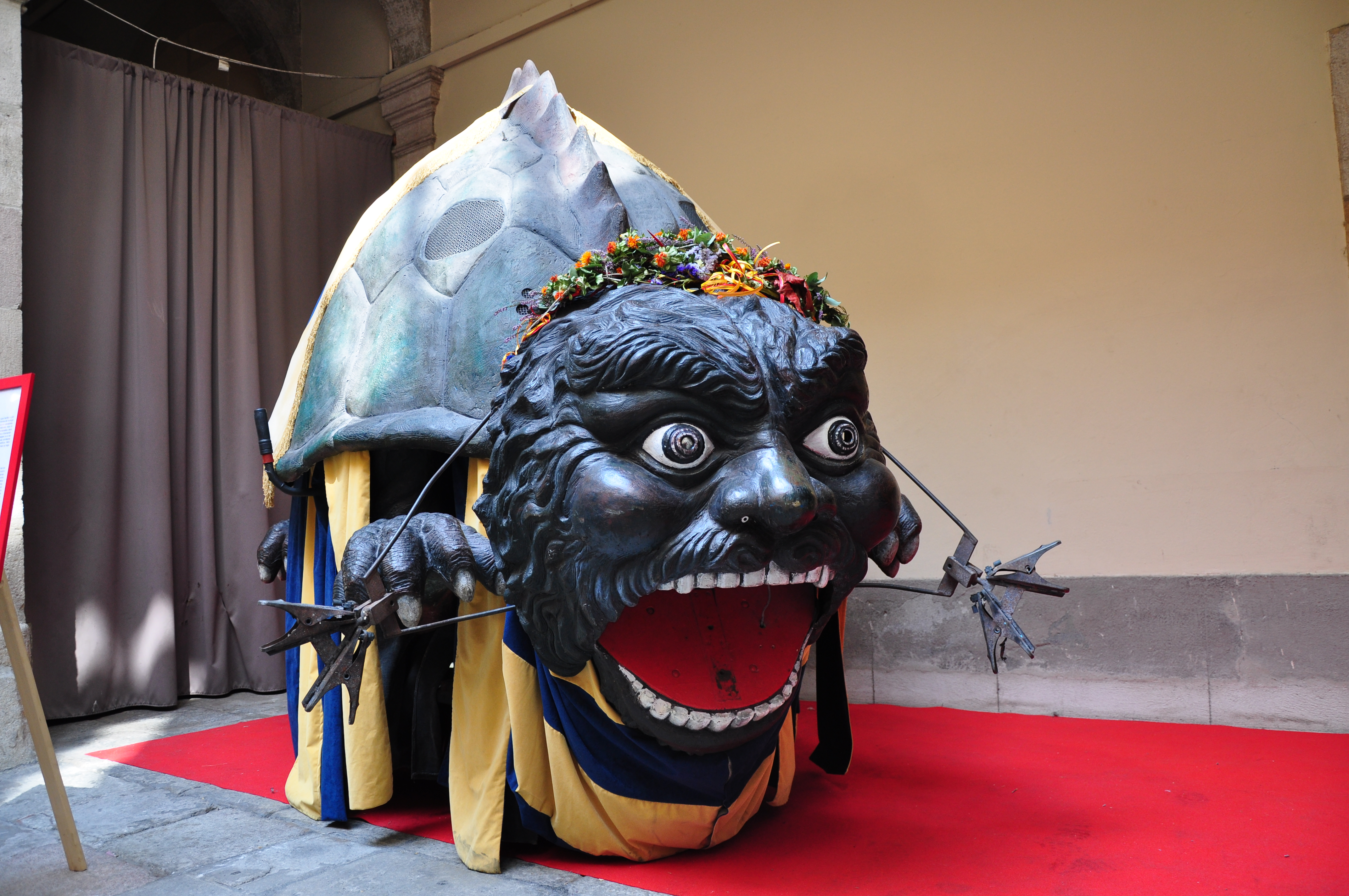 Mercè 2012. Tarasca (també coneguda com Cuca Fera) espossada al Palau de la Virreina. Compte amb aquesta figura del bestiari festiu barceloní, perquè tan aviat pot llançar per la boca foc com aigua o caramels. És un monstre amb forma de tortuga i rostre humà que allargassa el coll.